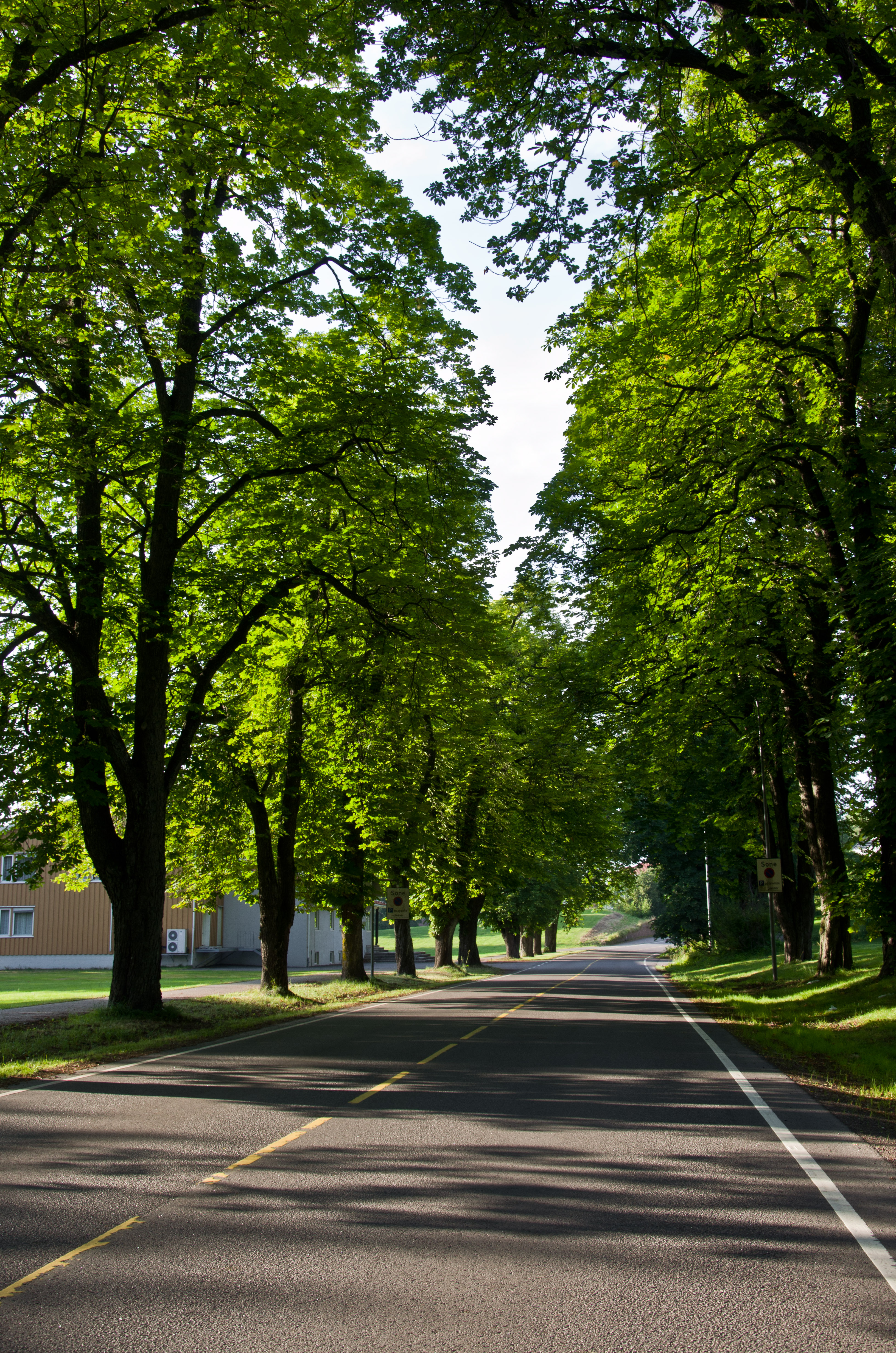 Fylkesvei 713 Nedre Vei, Horten